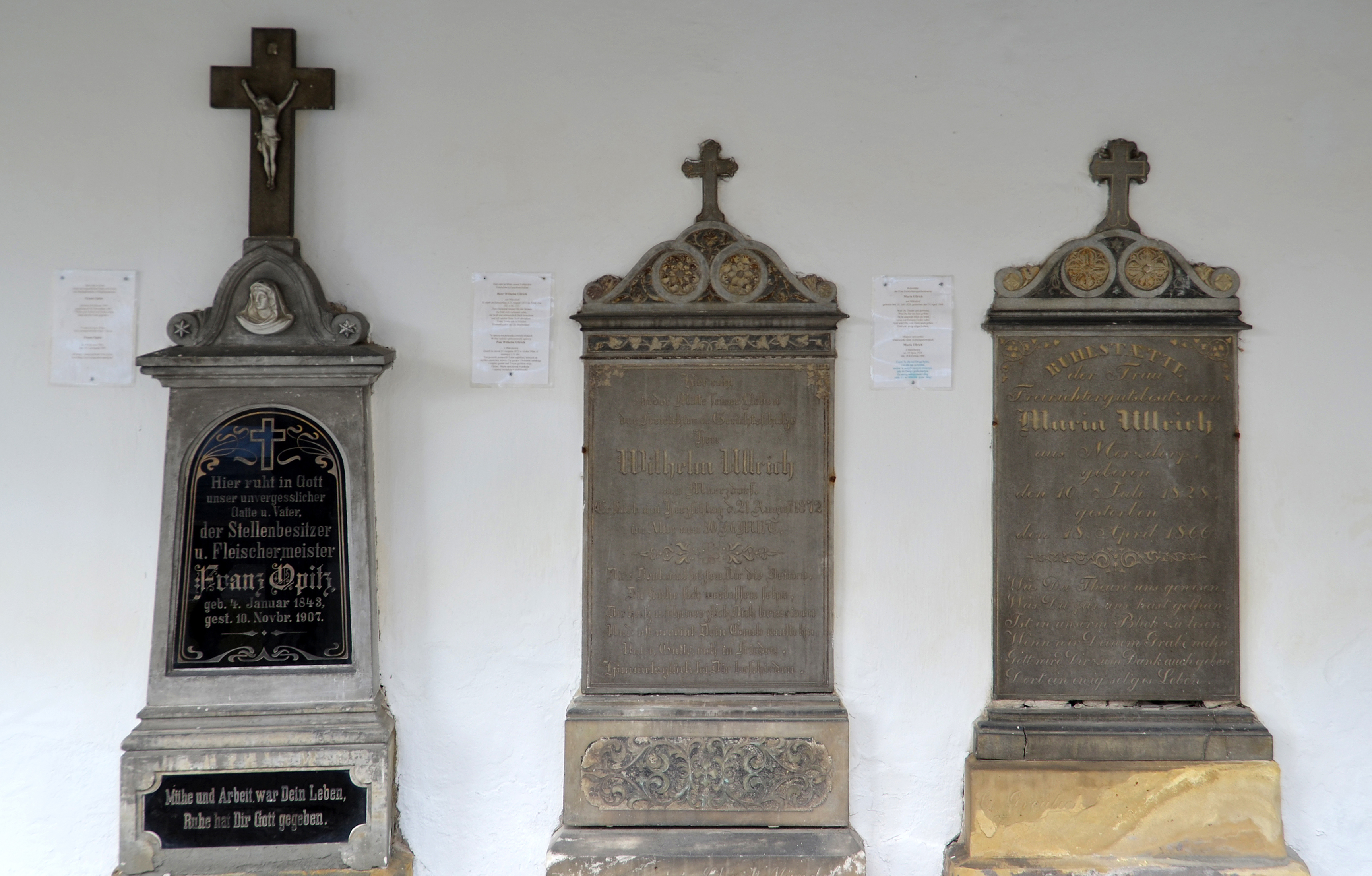 Żelazno, mur z obejściem podcieniowym z bramami